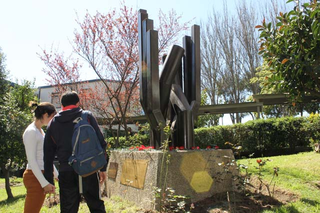 Memorial UPLA DDHH